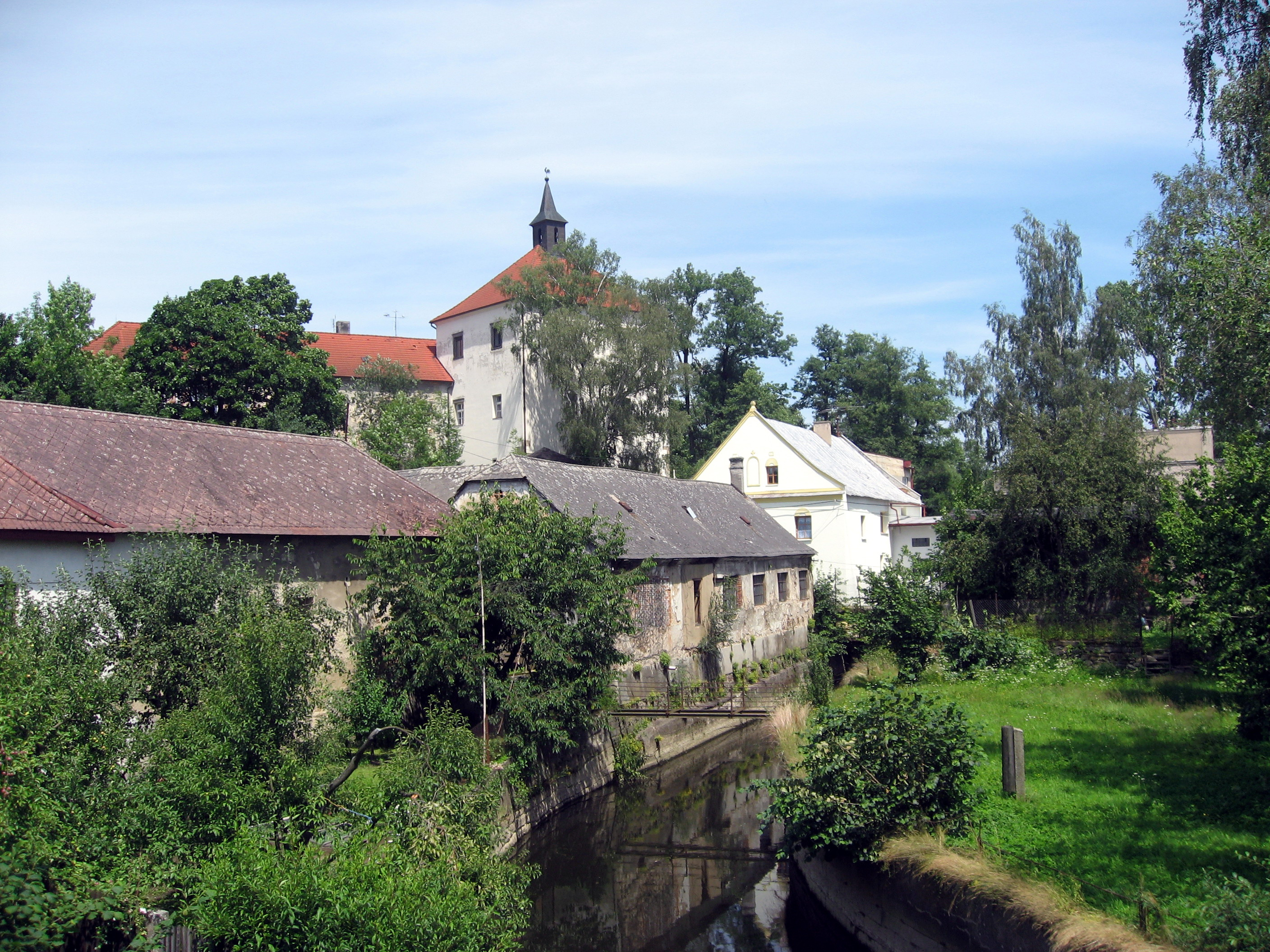 Okrouhlice